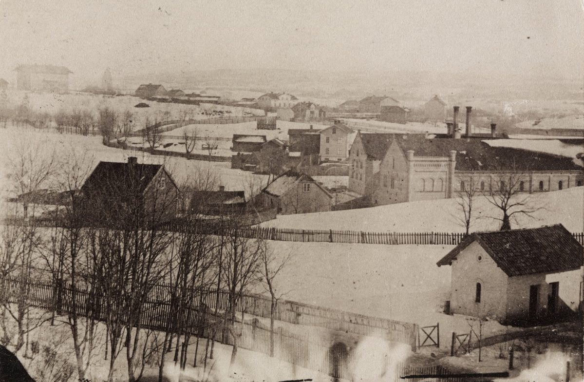 Dalsbergstien og Frydenlunds bryggeri, ca. 1850-1855